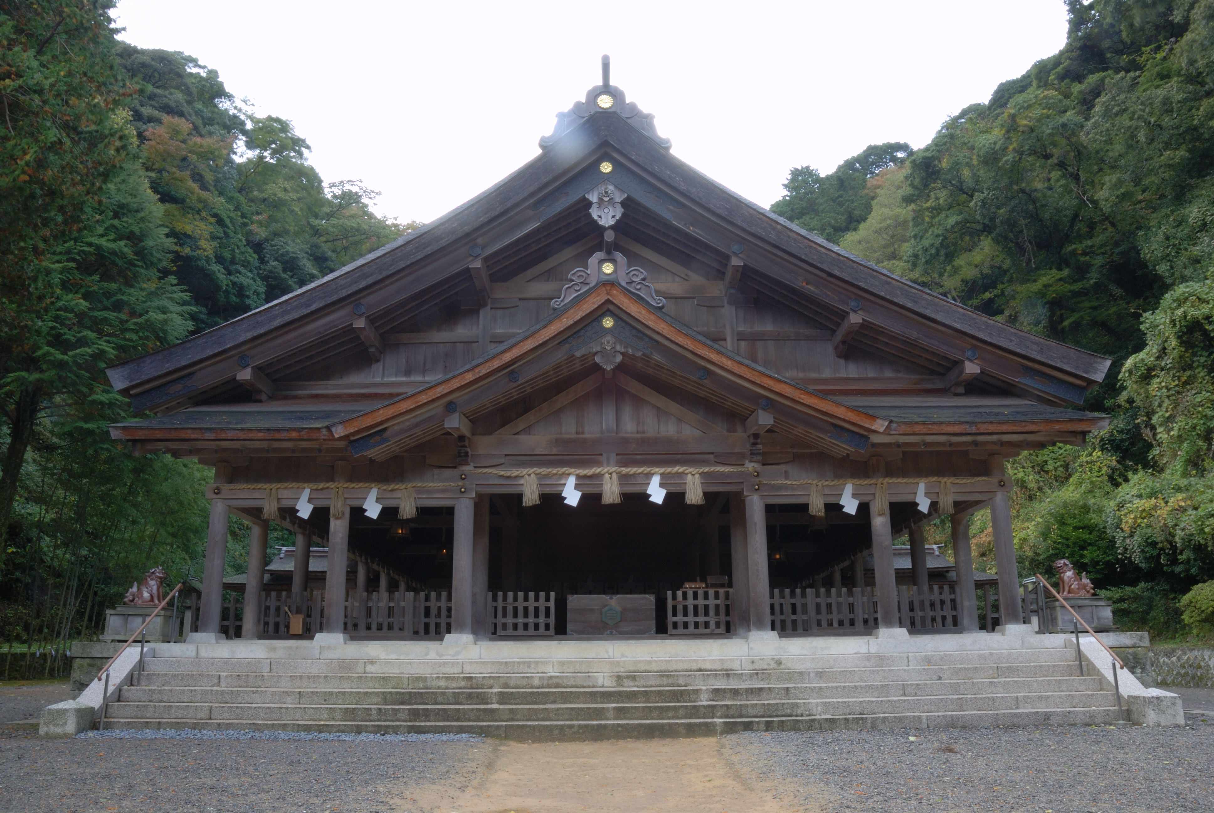 Miho jinja haiden